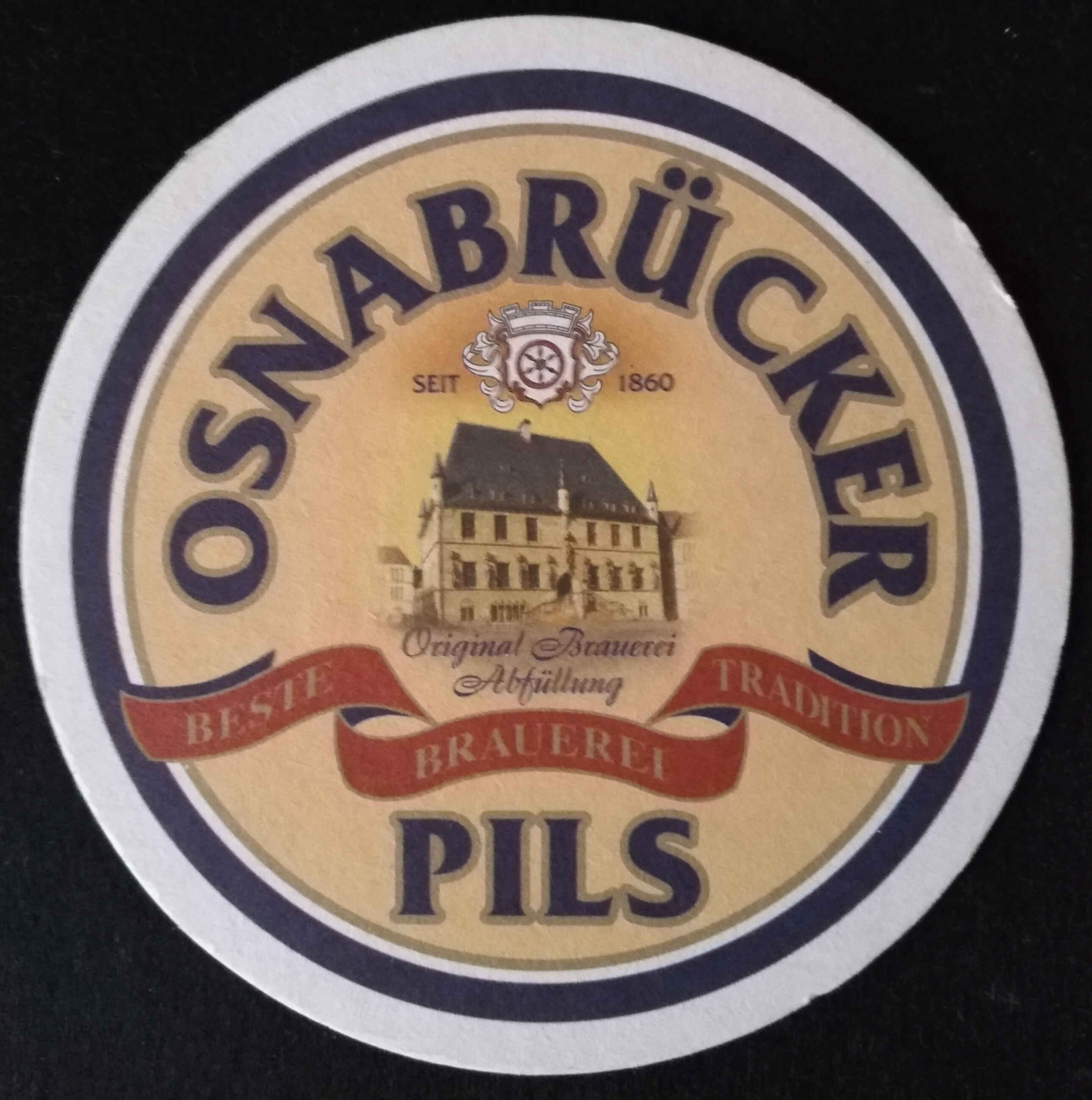 Bierdeckel mit dem Aufdruck der ehemaligen Biermarke "Osnabrücker Pils"